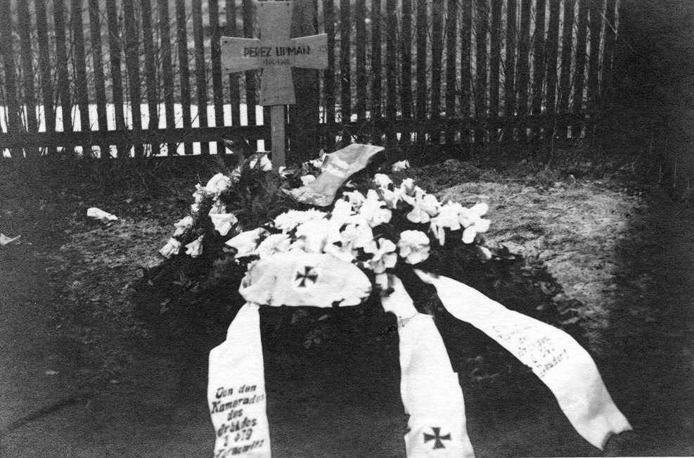 קברו של פרץ אופמן ז"ל ברוזינקה